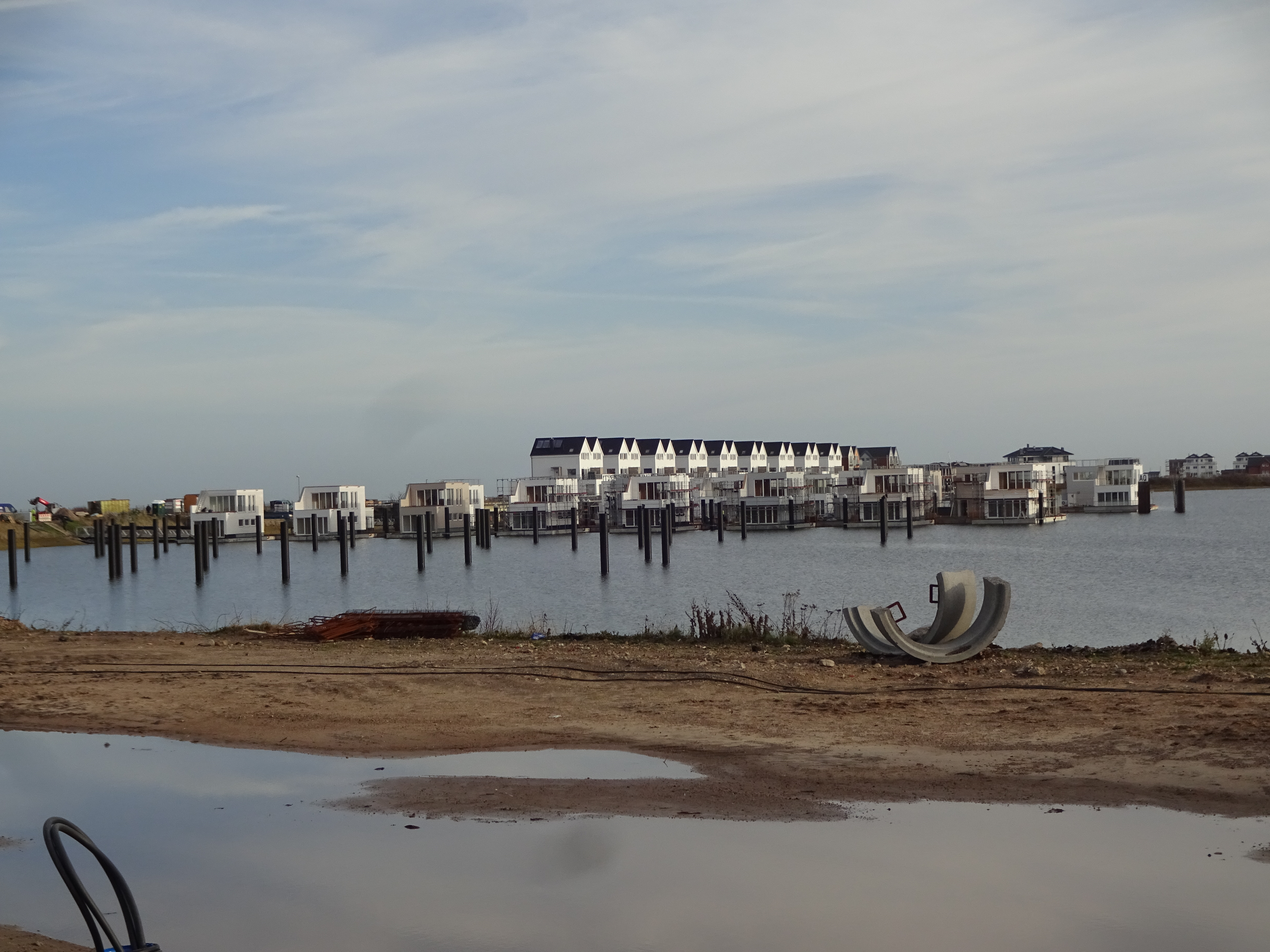 Schwimmende Häuser, gebaut von der HELMA Ferienimmobilien GmbH im Ostseeresort Olpenitz (früher Port Olpenitz)